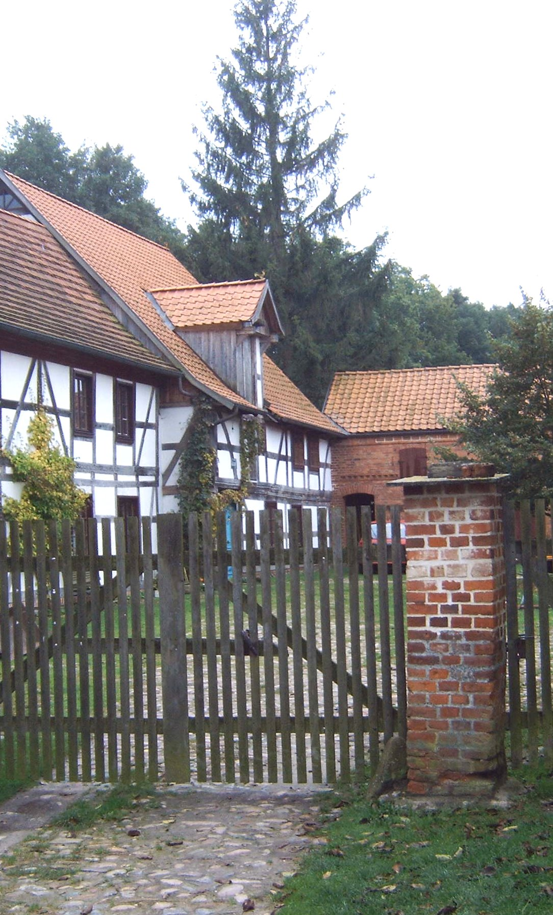 Eingang zur Reichwaldschen Mühle in Wiepke, Sachsen-Anhalt, Deutschland